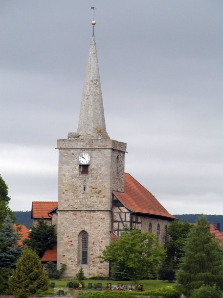 Kirche in Einhausen/Thüringen